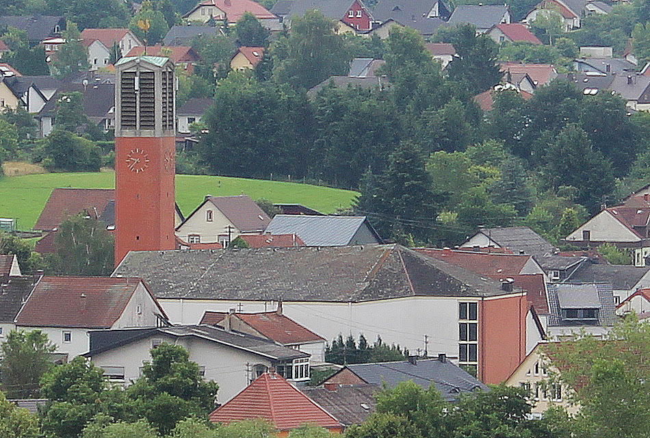 Die katholische Pfarrkirche St. Stephanus in Schmelz, Landkreis Saarlouis, Saarland